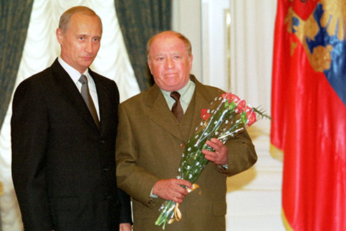 МОСКВА, КРЕМЛЬ. Церемония вручения государственных наград. Орден «За заслуги перед Отечеством» IV степени вручен режиссеру, артисту Московского драматического театра на Малой Бронной Льву Дурову.